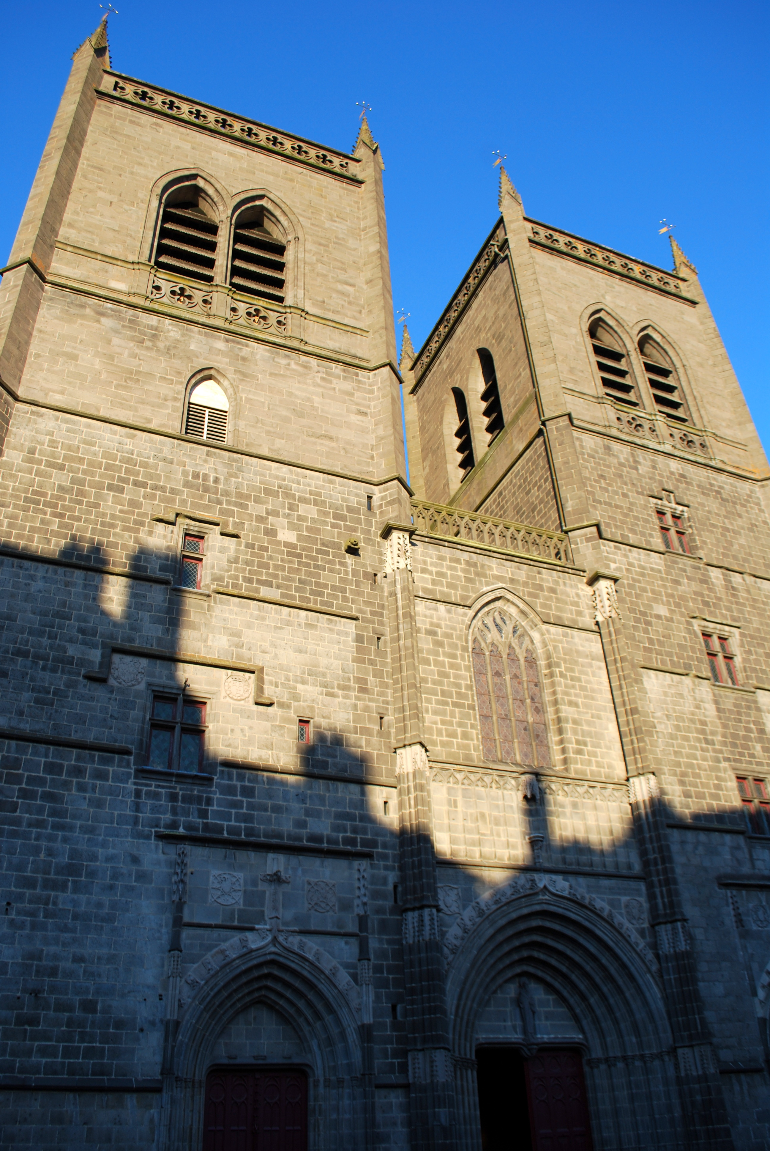 Cathédrale Saint-Pierre est le symbole la « Capitale religieuse de la Haute Auvergne » Saint-Flour